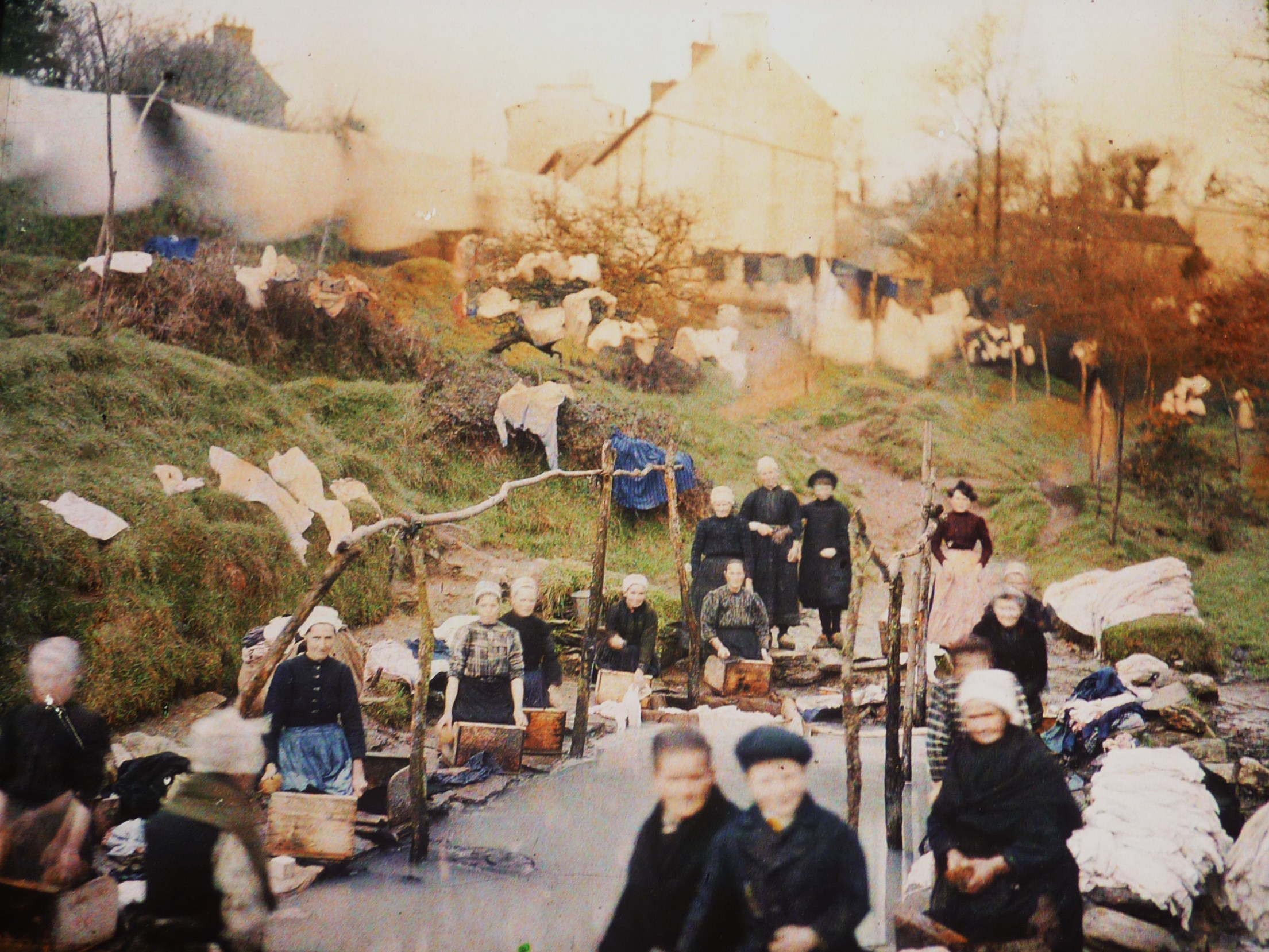 Brest : le lavoir de Barullu-Huella à Saint-Pierre-Quilbignon en 1912 (photo autochrome)